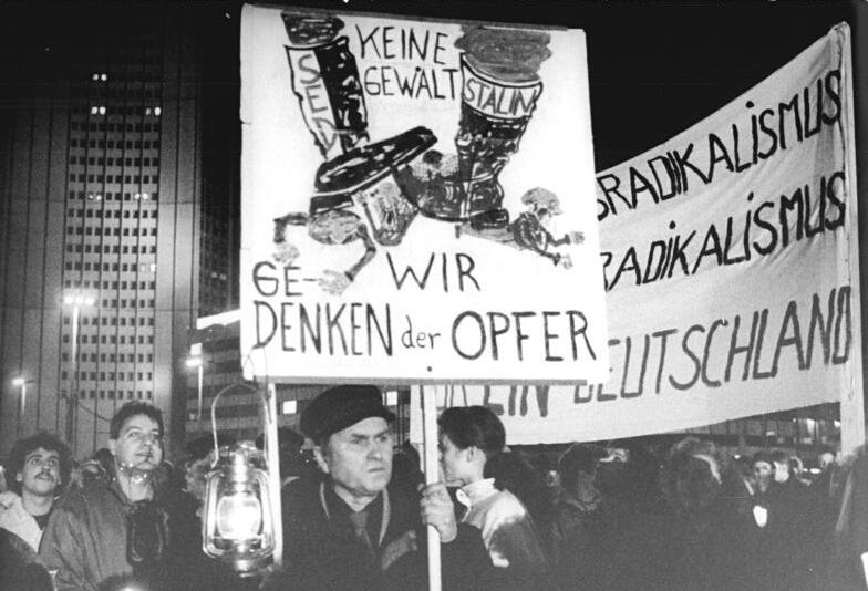 Leipzig, Montagsdemonstration ADN-ZB Gahlbeck 18.12.89 Leipzig: Montagsdemo- Hunderttausende Bürger trafen sich zu einem Schweigemarsch durch die Leipziger Innenstadt.